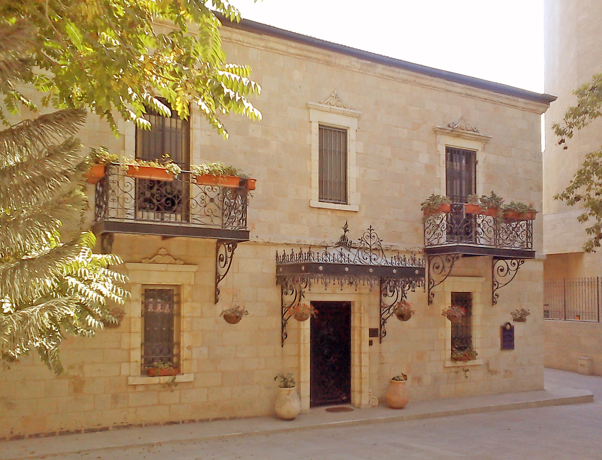 בית משכית ברחוב הרב קוק בירושלים, שימש בעבר כבית הקונסול האיטלקי. בנוי בסגנון הרנסאנס. החלונות כוללים סורגים נאים ומקושטים בראשם בעיטור על אקאנתוס. דלתות העץ מקולפות בקישוטים.